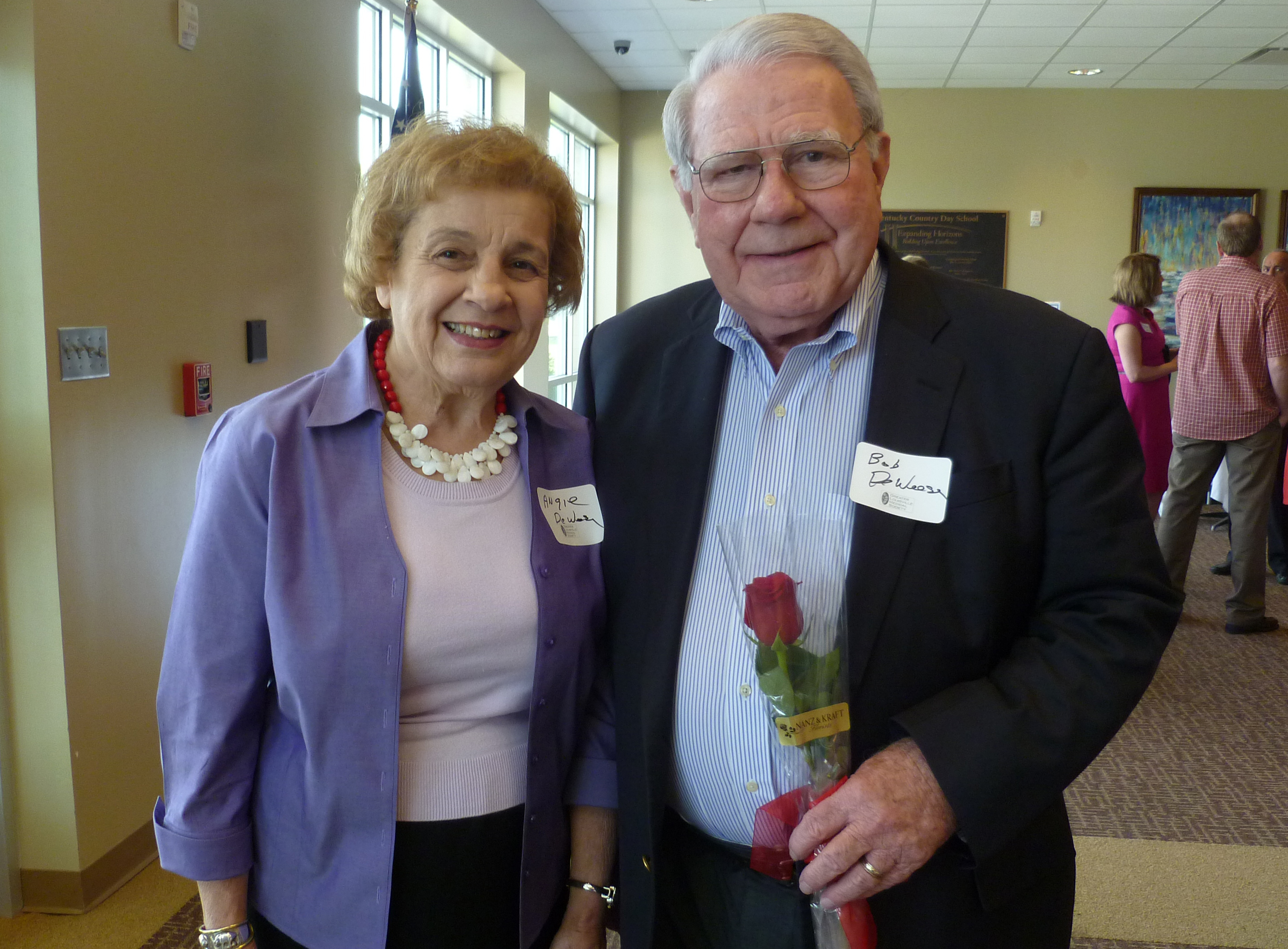 Angie DeWeese and Past President Bob M. DeWeese, MD.